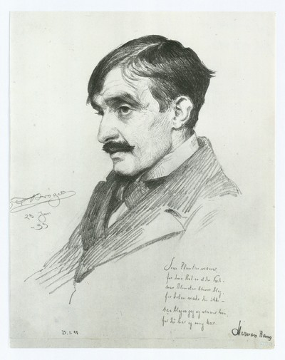 Herman Bang. Piirroskuva, toisen alkuperäisversio, 1899 (kuvan perusteella tulkittuna)